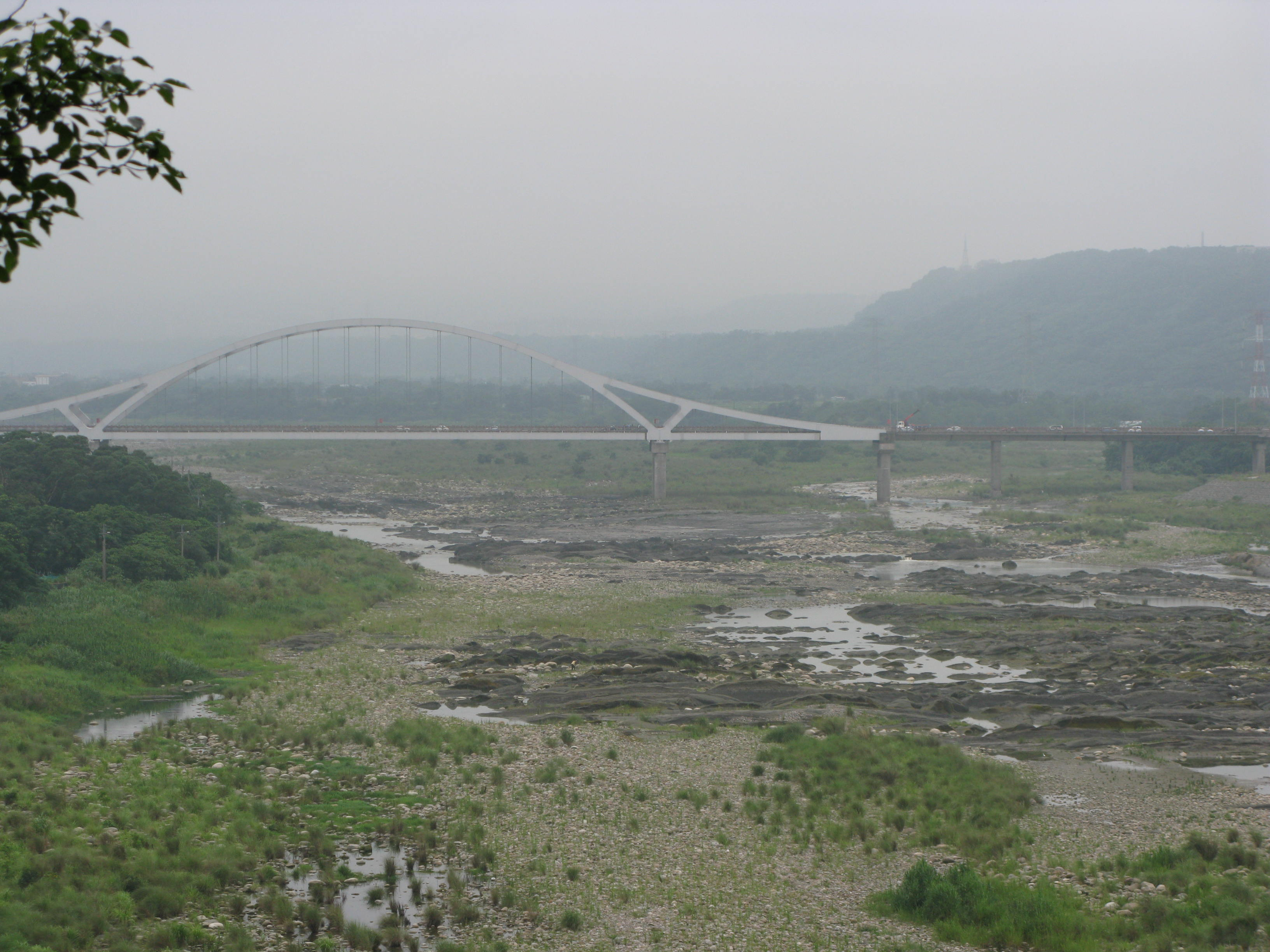 臺灣桃園市大溪區境內的大漢溪。